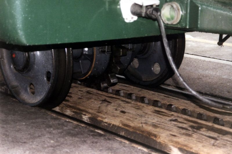 Zahnrad unter einem Wagen der Wengernalpbahn